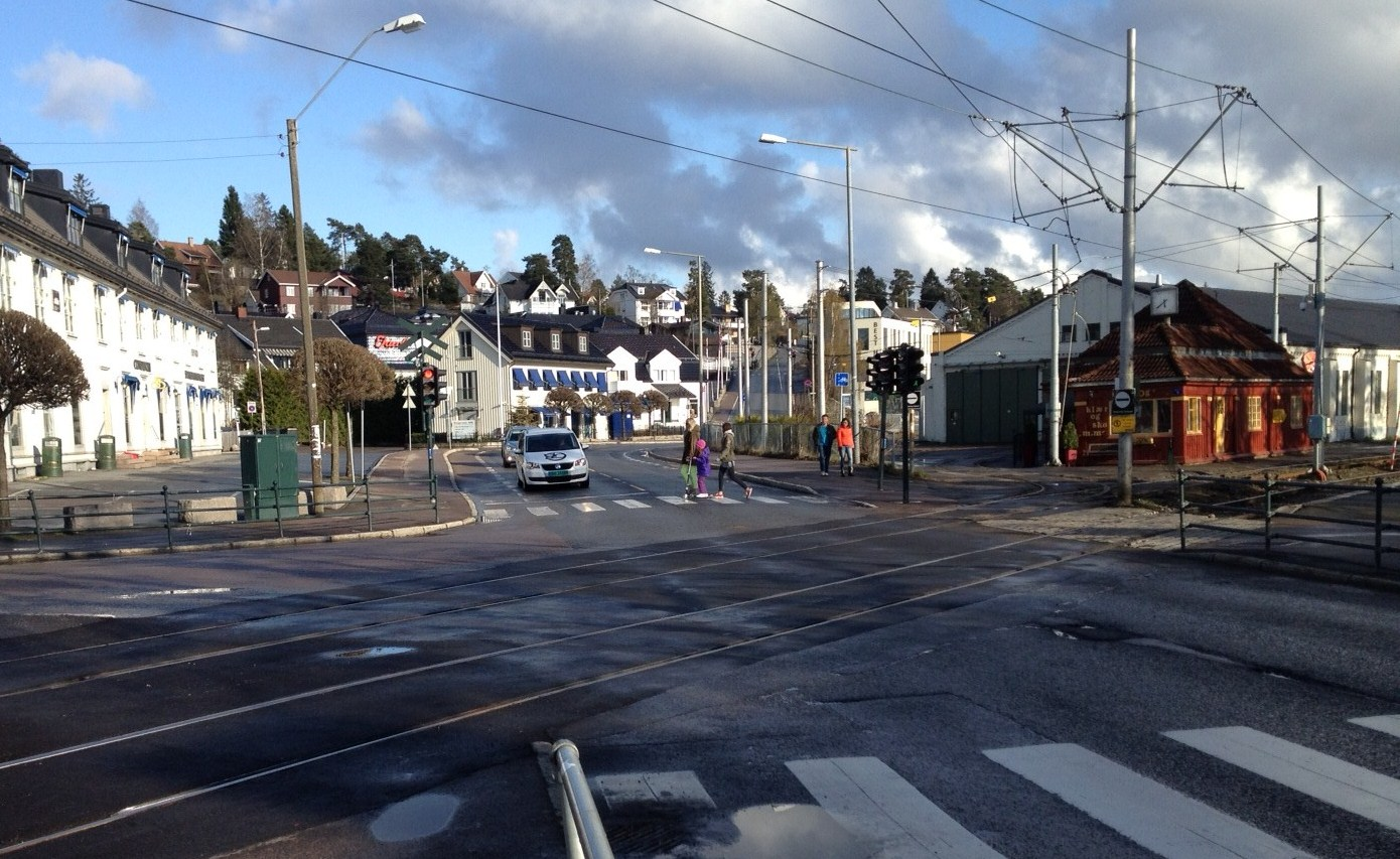 Holtet "sentrum", der trikkelinja krysser. Oslo.